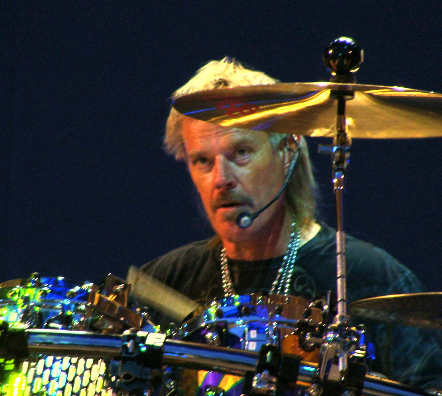 Frank Beard en un concierto de ZZ Top en el Bilbao BBK Live 2008.